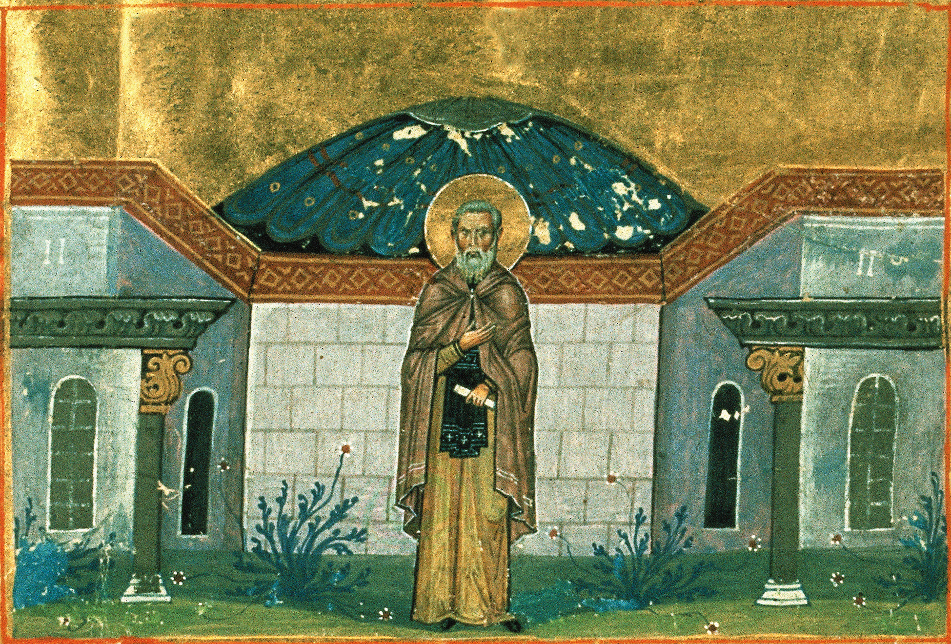 Преподобный Григорий Декаполит Константинополь. 985 г. Миниатюра Минология Василия II. Ватиканская библиотека. Рим.